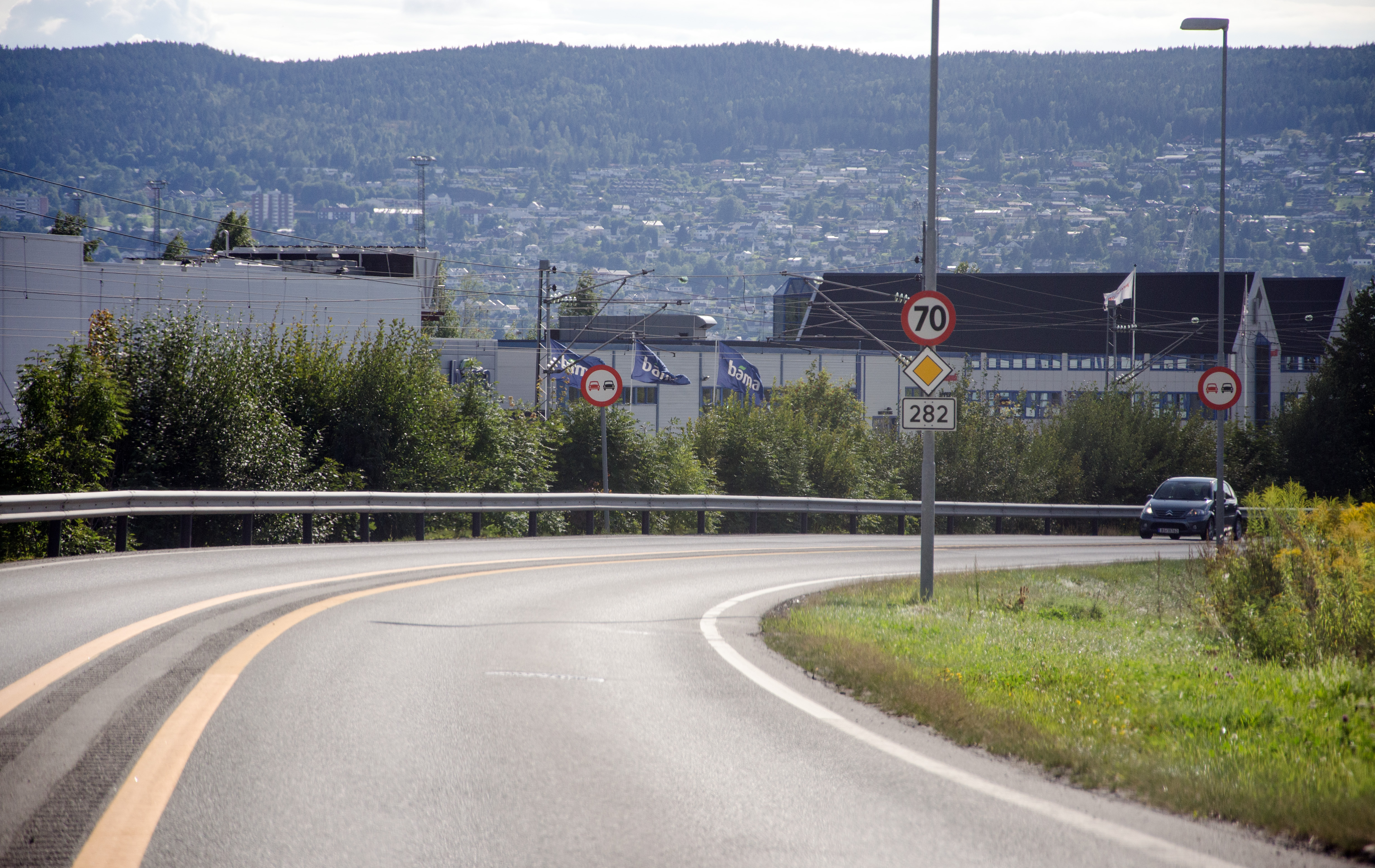 Fylkesvei 282 Strandveien